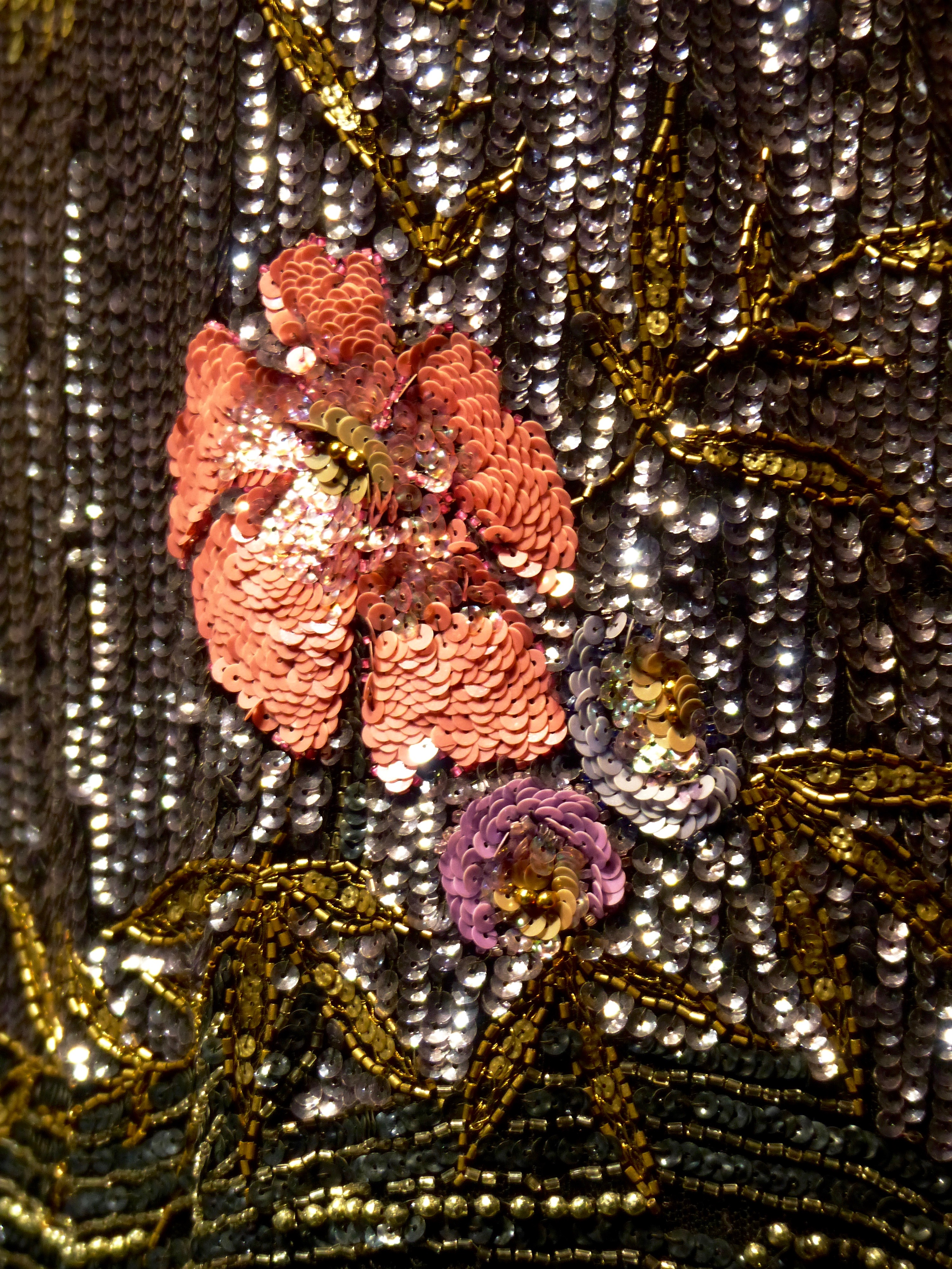 Sonderaustellung Macht der Mode: Tanzkleid mit Celluloidpailletten und Glasperlen, Mitte 1920er Jahre (Detail) GLAM-on-Tour: Industriemuseum Textilfabrik Cromford in Ratingen 2016 Wikipedianer fotografieren vom 10.–12. Juni 2016 die Exponate der Ausstellung „Die Macht der Mode“ im Industriemuseum Textilfabrik Cromford. This photo was taken during a project supported by WMDE.